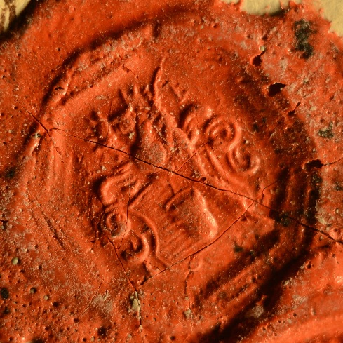 Prückler József Kalazancius (1778–1848) pékmesternek, választott pesti polgárnak, cs. kir. századosnak a viaszpecsétje a 19. század első feléből